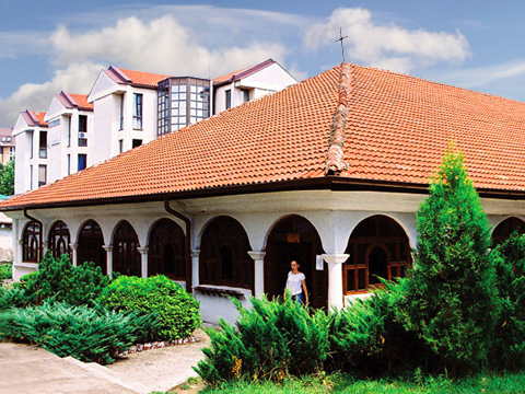 La iglesia antigua ¨Odzaklija¨. Srpskohrvatski / српскохрватски: Crkva ¨Odzaklija¨.